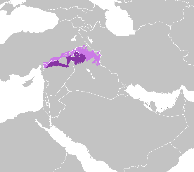 Árabe mesopotámico del Norte Hablantes mayoritarios Zonas donde otra lengua es mayoritaria (principalmente kurdo)